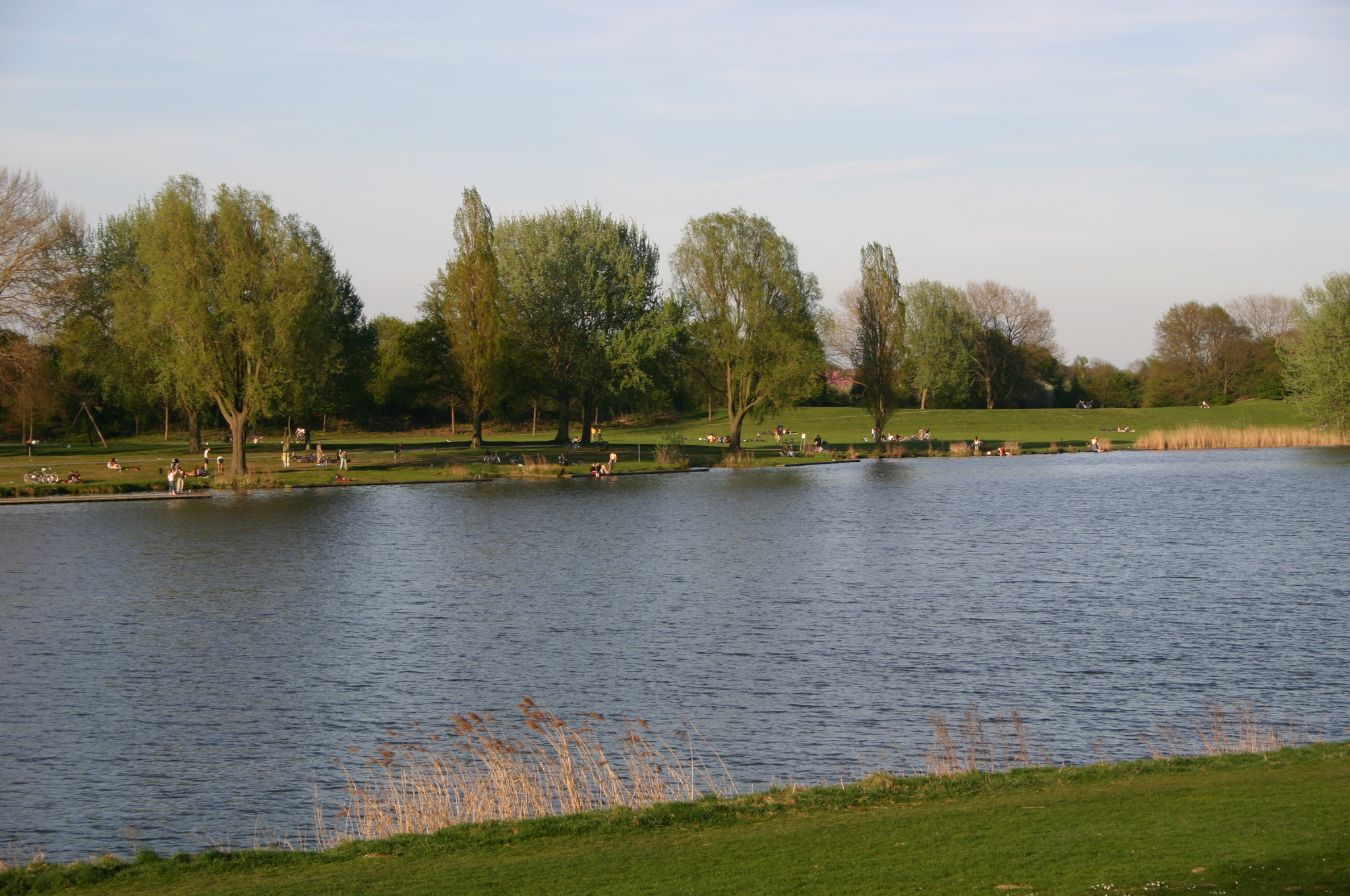 Werderinsel (Stadtwerder) vom Neustädter Ufer aus